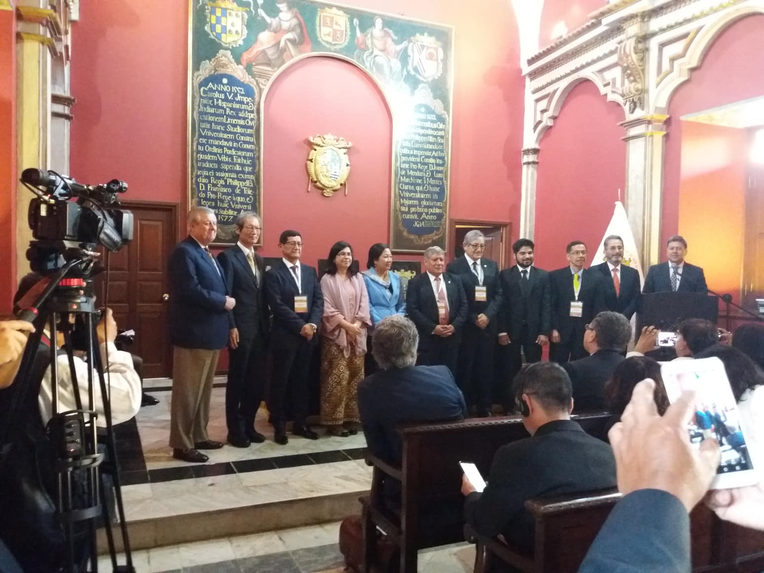 Inauguración del Centro de Estudios Asiáticos de la Universidad Nacional Mayor de San Marcos.